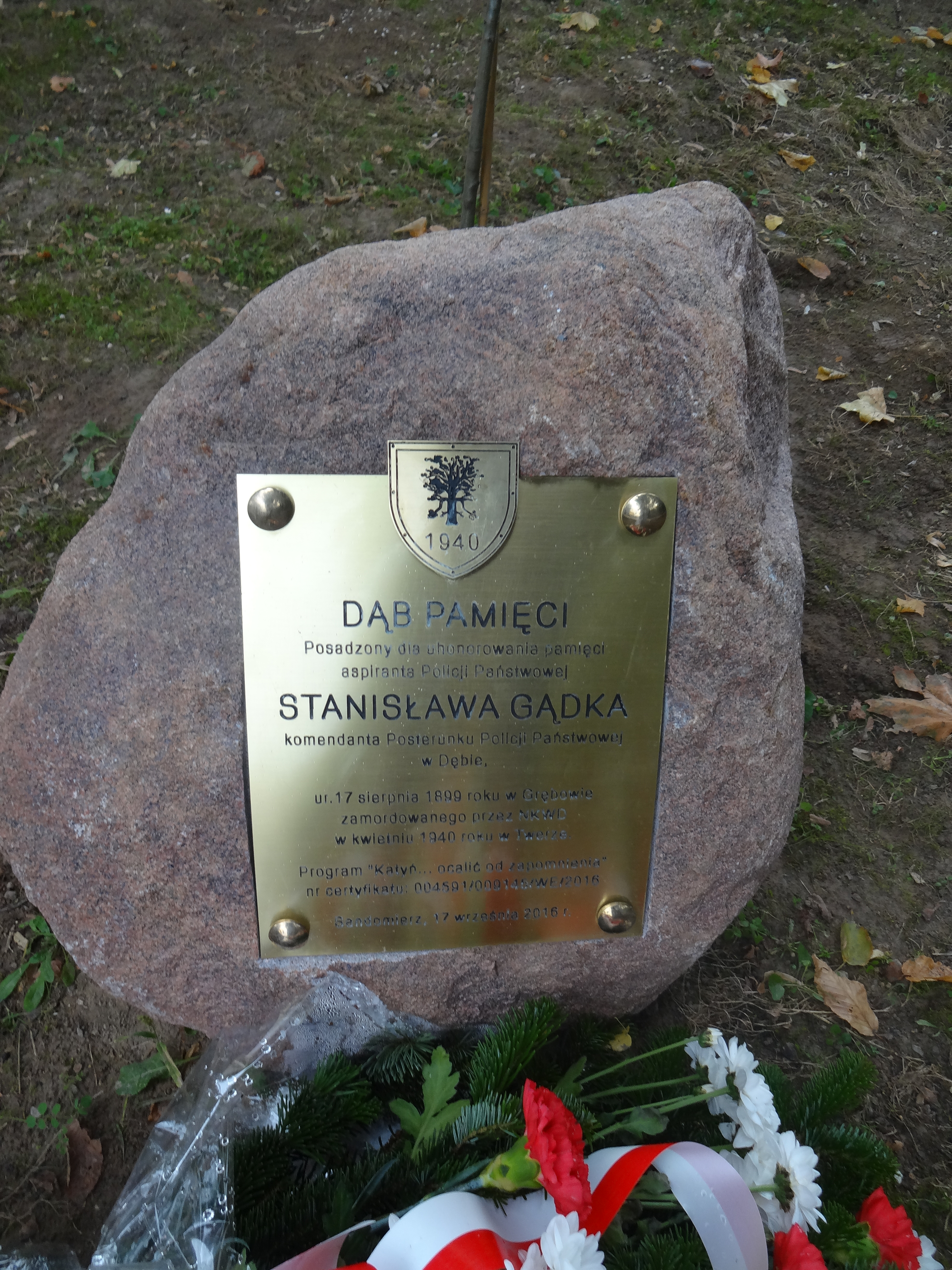 Dąb Pamięci asp. PP Stanisława Gądka na Cemntarzu Katedralnym w Sandomierzu